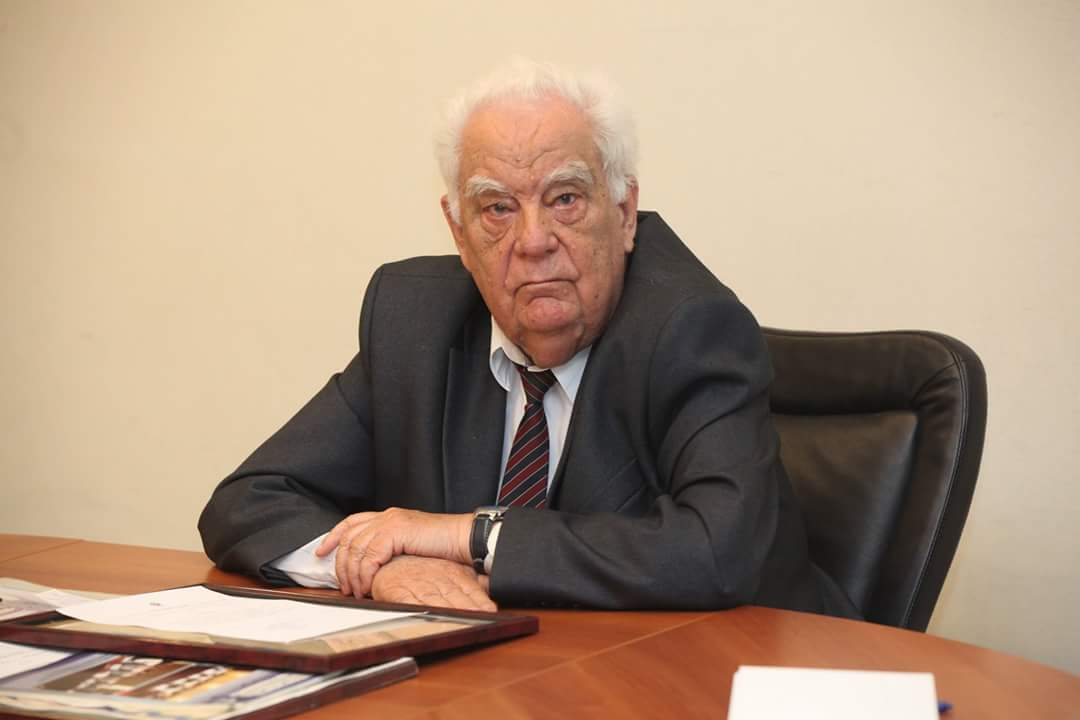 Марат Петрович Васильчук